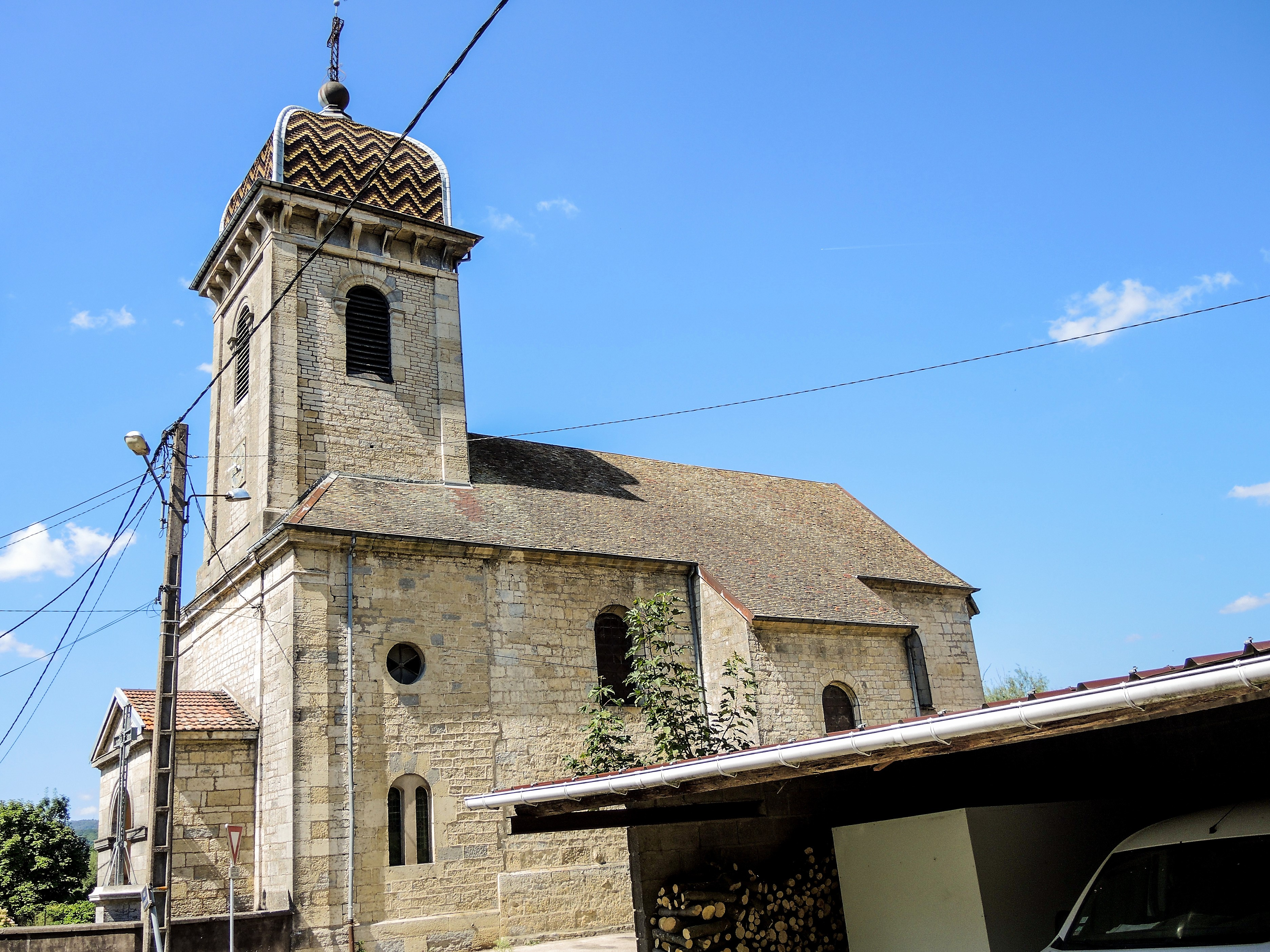 Eglise de la Nativité de Notre-Dame. Chalèze. Doubs